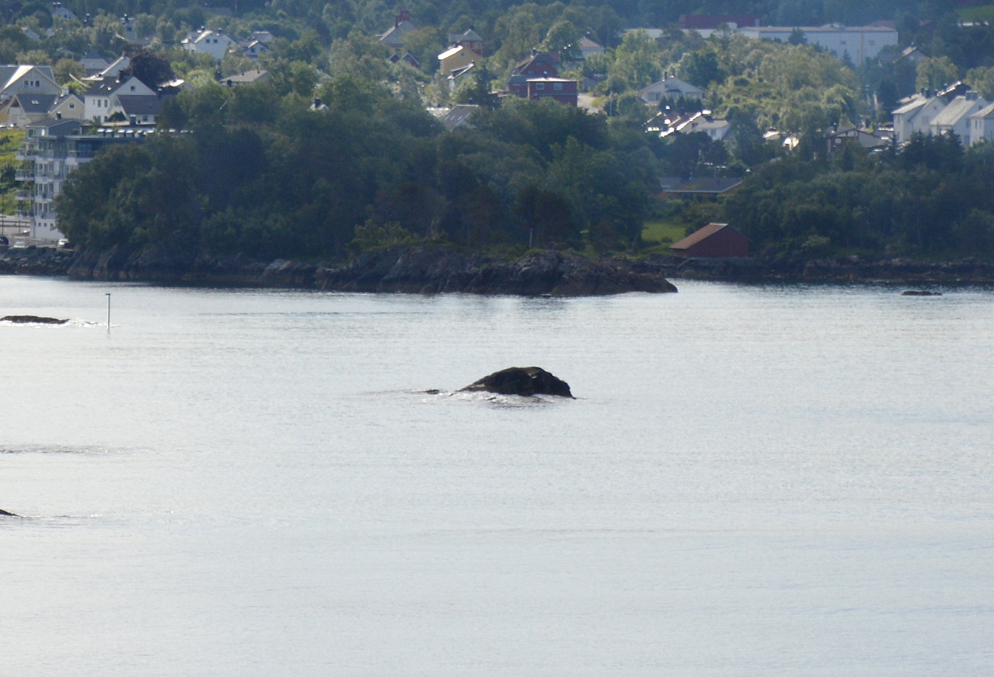 Insel Skarveskjeret bei Alesund